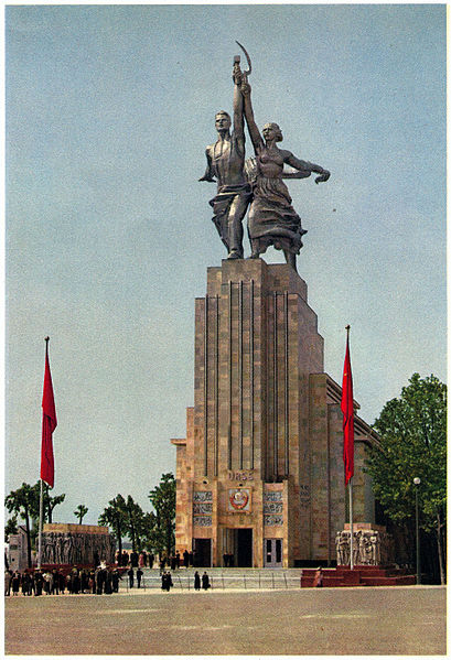 A Paris-expo-1937-pavillon de l'URSS-13 fájl színben javított változata